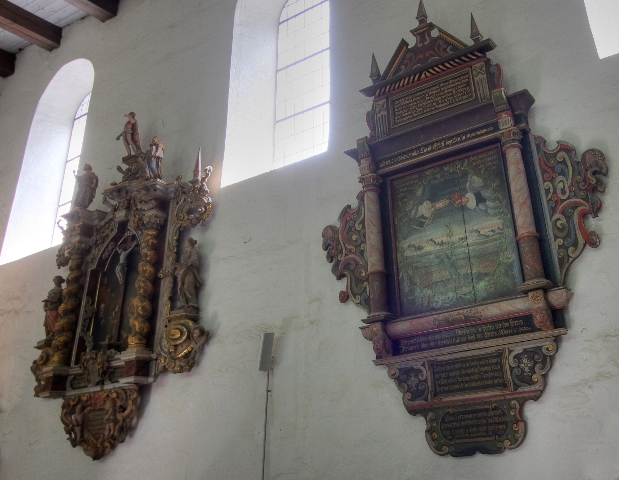 Petrikirche in Bosau, Epitaphe